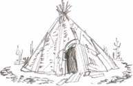 Chum